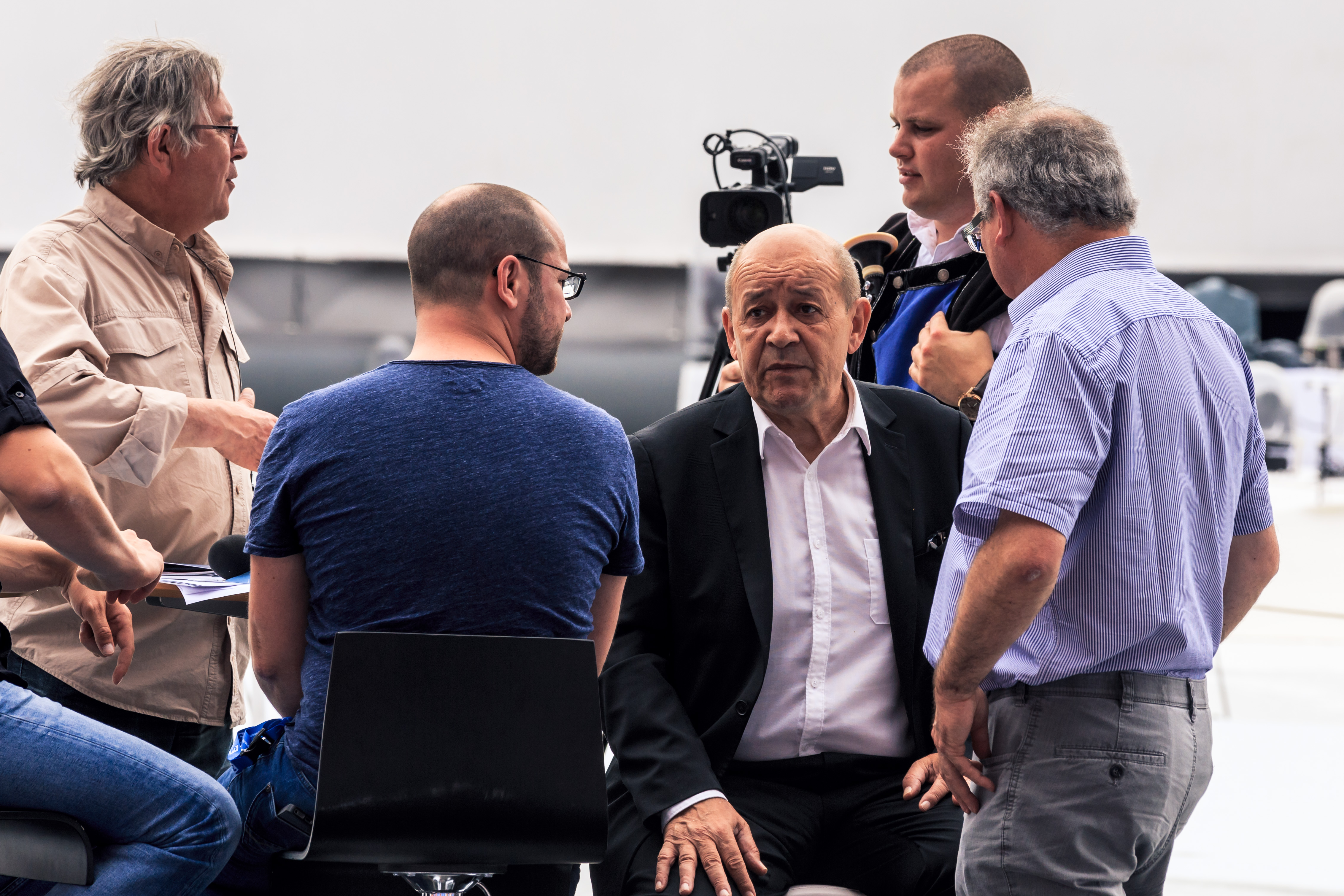 Épreuve d'été du Championnat national des bagadoù de Première catégorie organisée au stade du Moustoir dans le cadre du Festival Interceltique de Lorient en Bretagne.